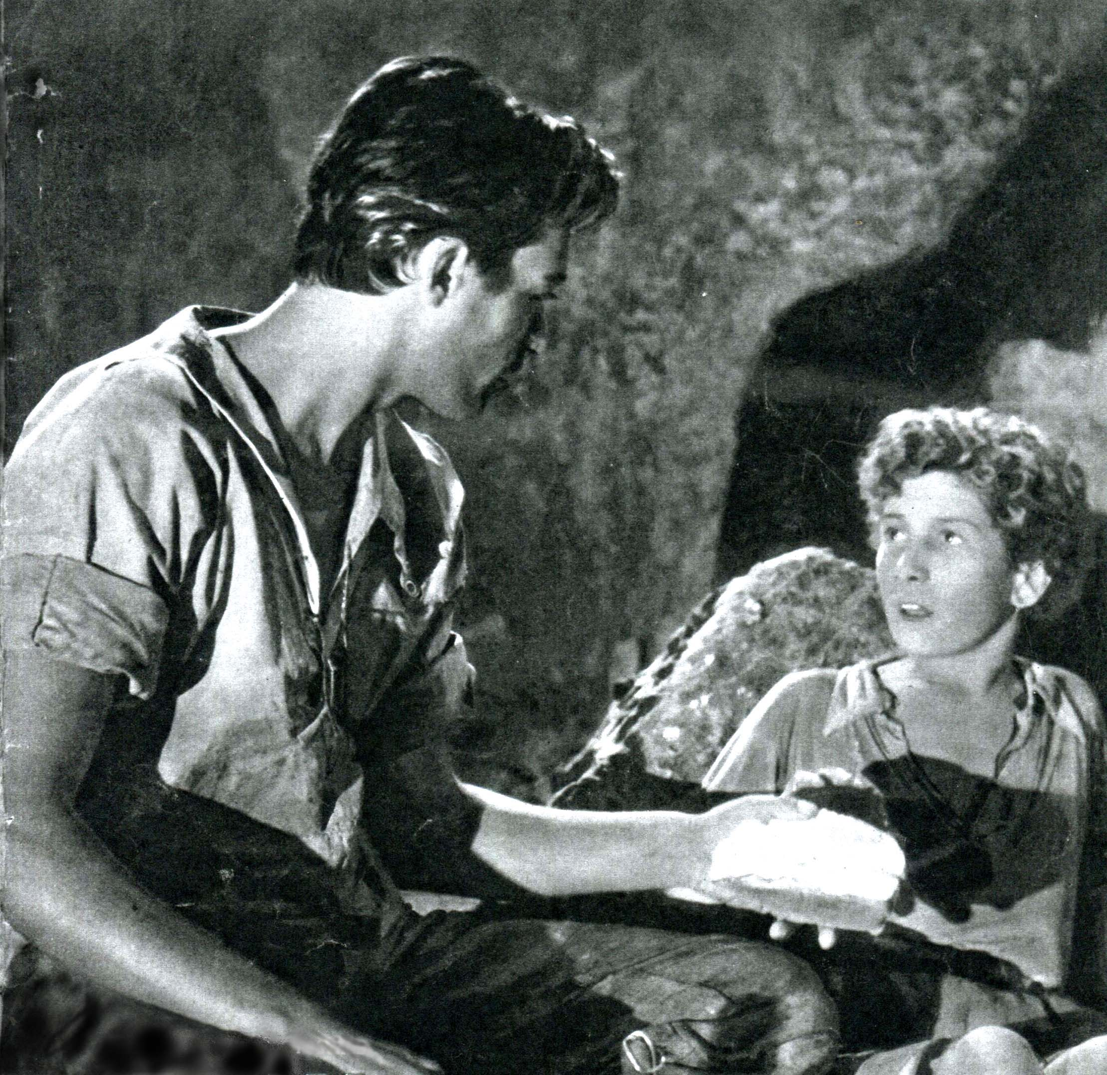 Piccoli naufraghi (Calzavara 1939) - foto scena